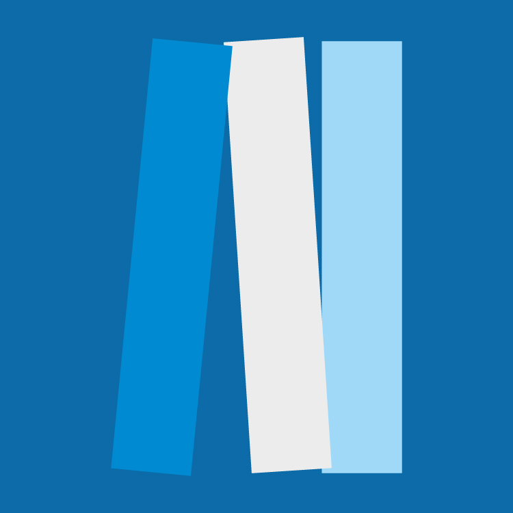 logo de editorial INTA